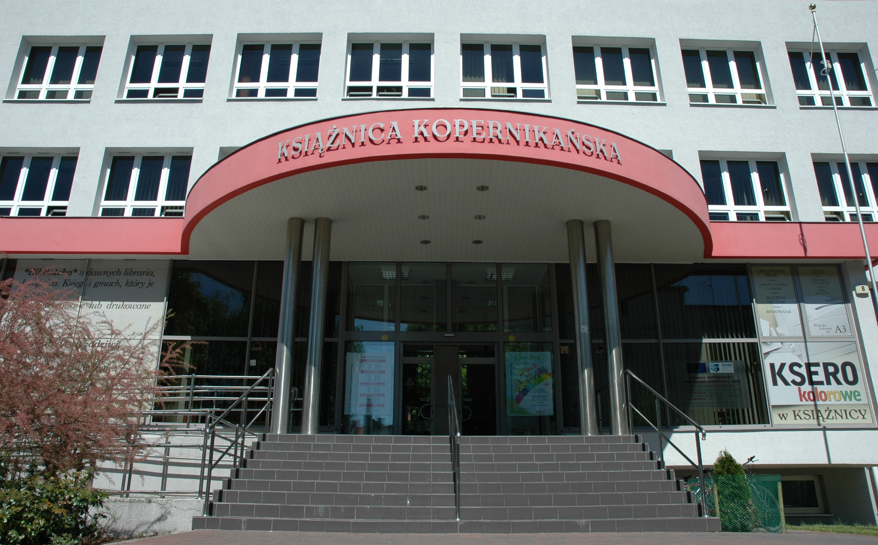 Książnica Kopernikańska w Toruniu - widok po przebudowie w 2005 r. Fot. Tomasz Dorawa.